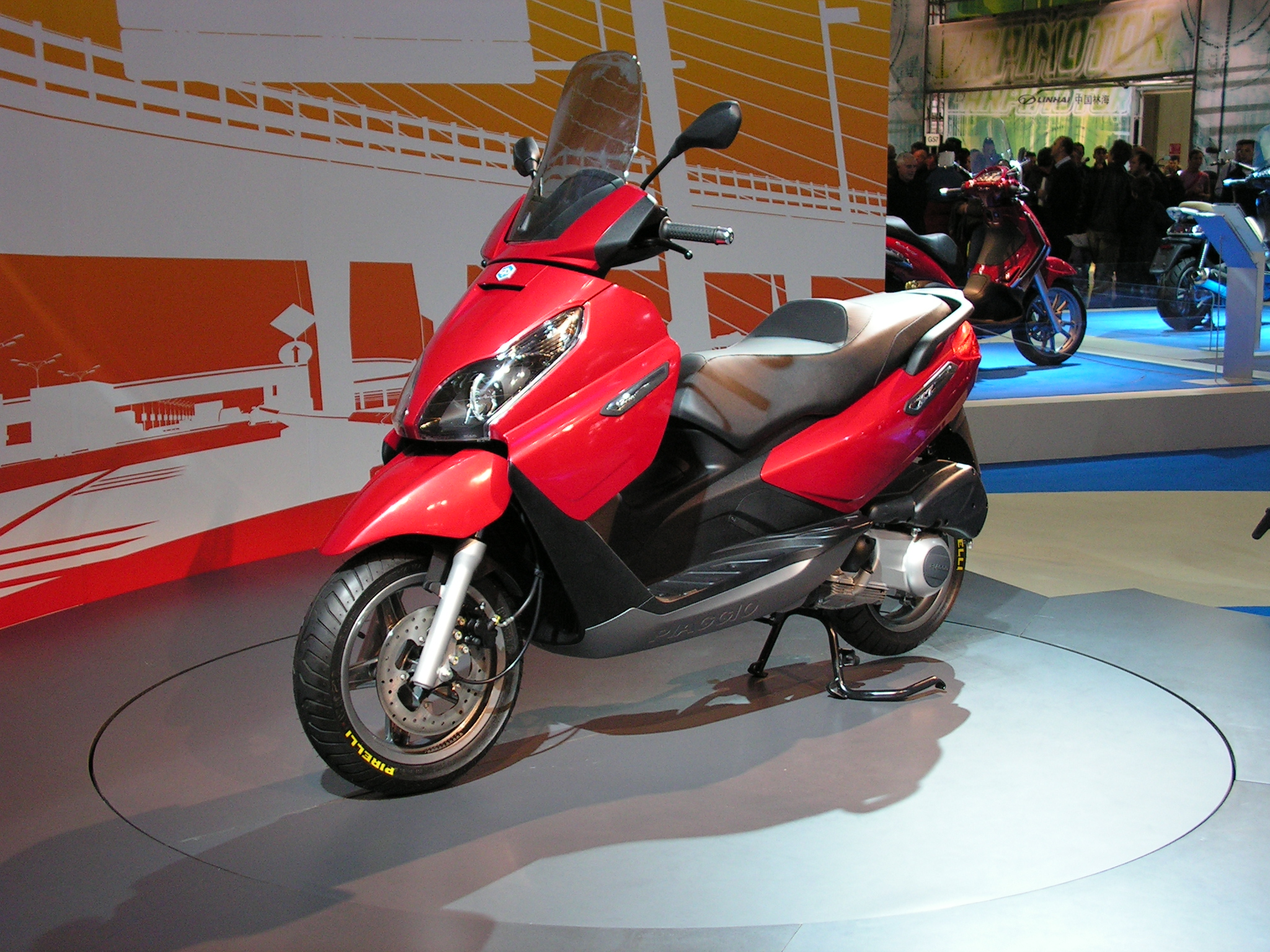 Piaggio X7 - EICMA 2007, Milan (Italy)